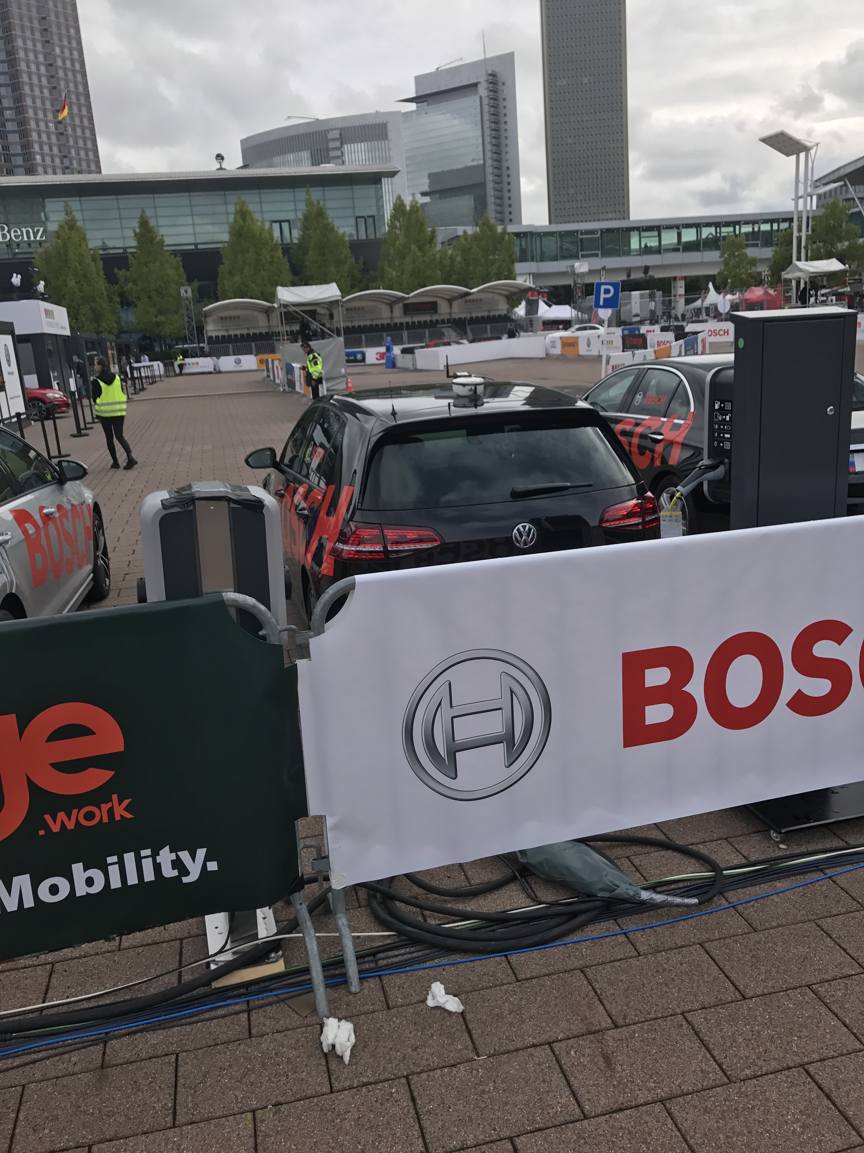 Vehículo do fabricante Bosch preparado para unha demostración de Aparcamento Robotizado na Feira do Automóbil de Frankfurt. 2017.